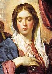 La obra representa la coronación de la Virgen María, madre de Jesucristo, por los tres miembros de la Santísima Trinidad.